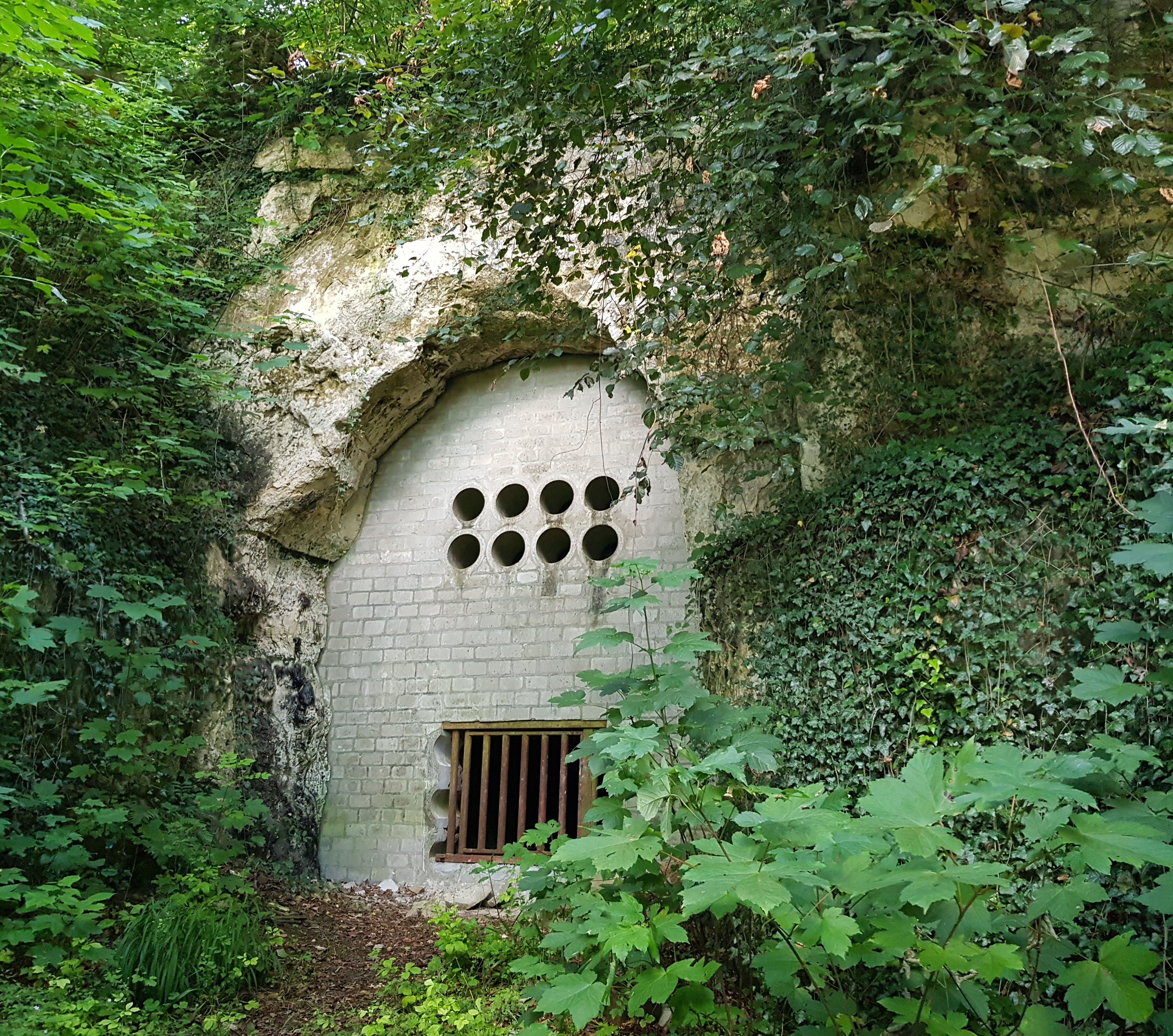 Kloostergroeve, Geulhem, Nederland